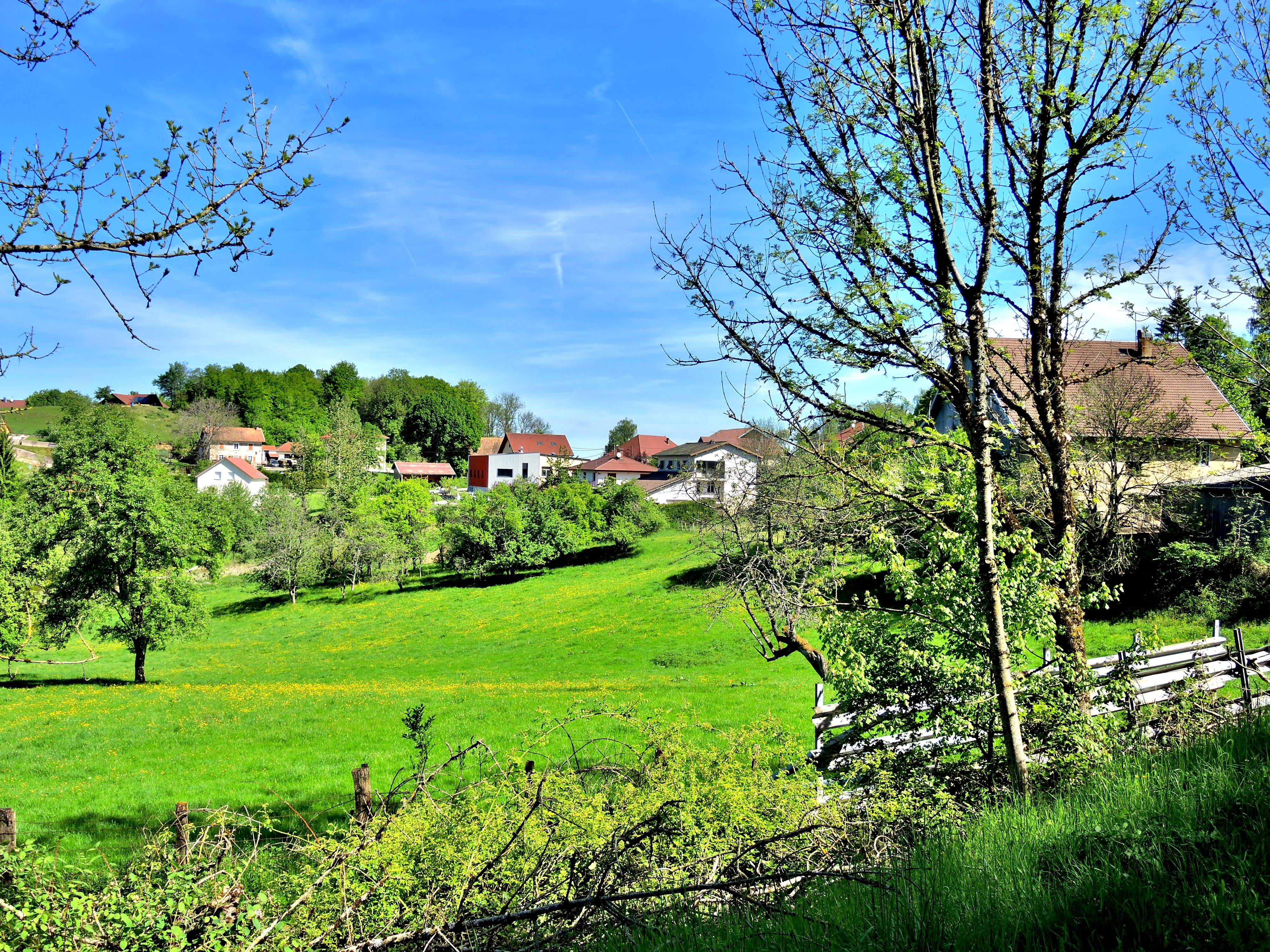 Panorama sur le village depuis la route vers Vercel. Passavant, Doubs.